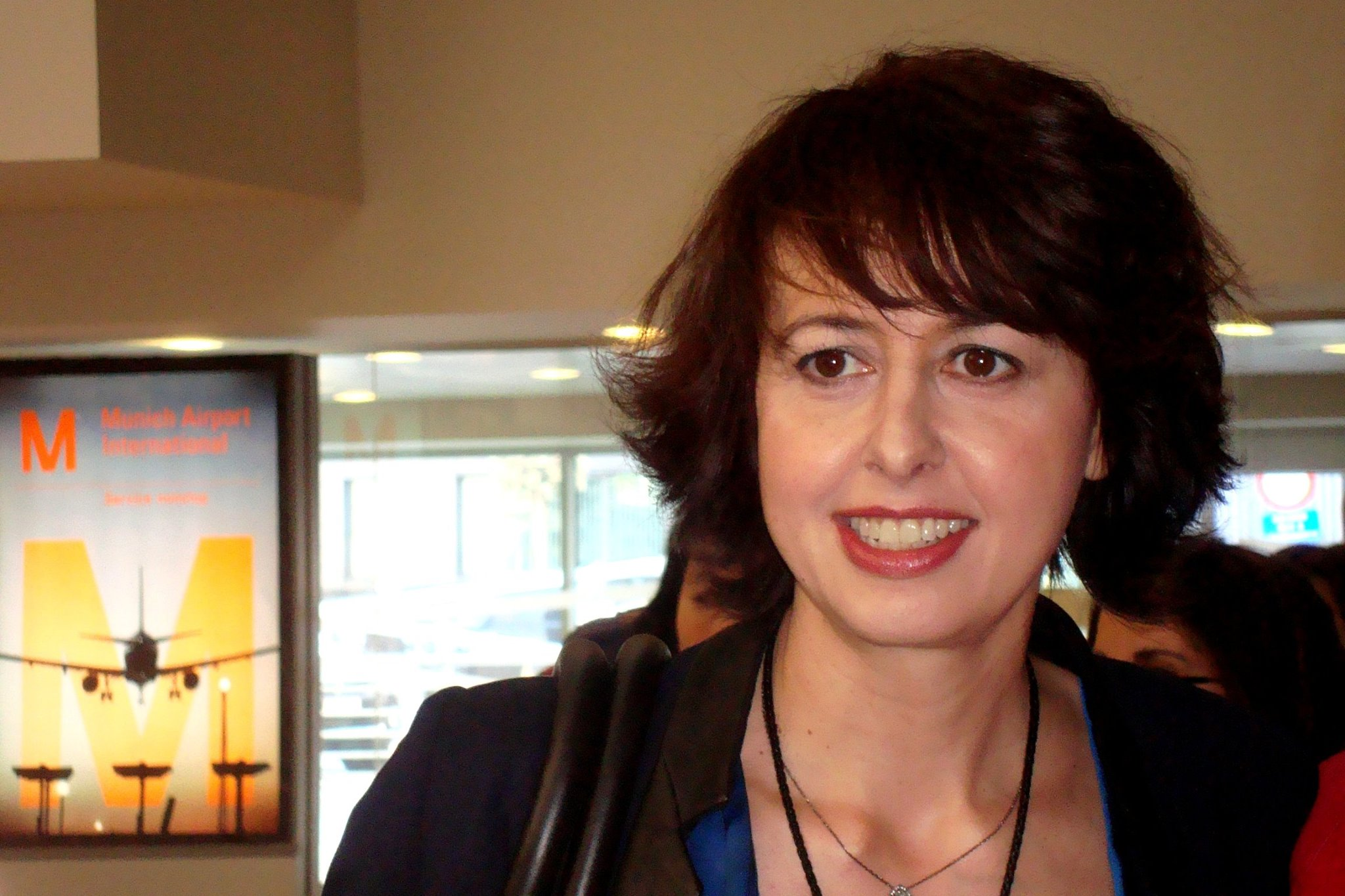 Valérie Bonneton sur le tournage du film Eyjafjallajökull (Le Volcan au Québec) en 2012.